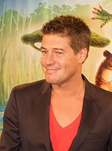 Martijn Krabbé en gezin bij de Europese première Cirque du Soleil in Amsterdam